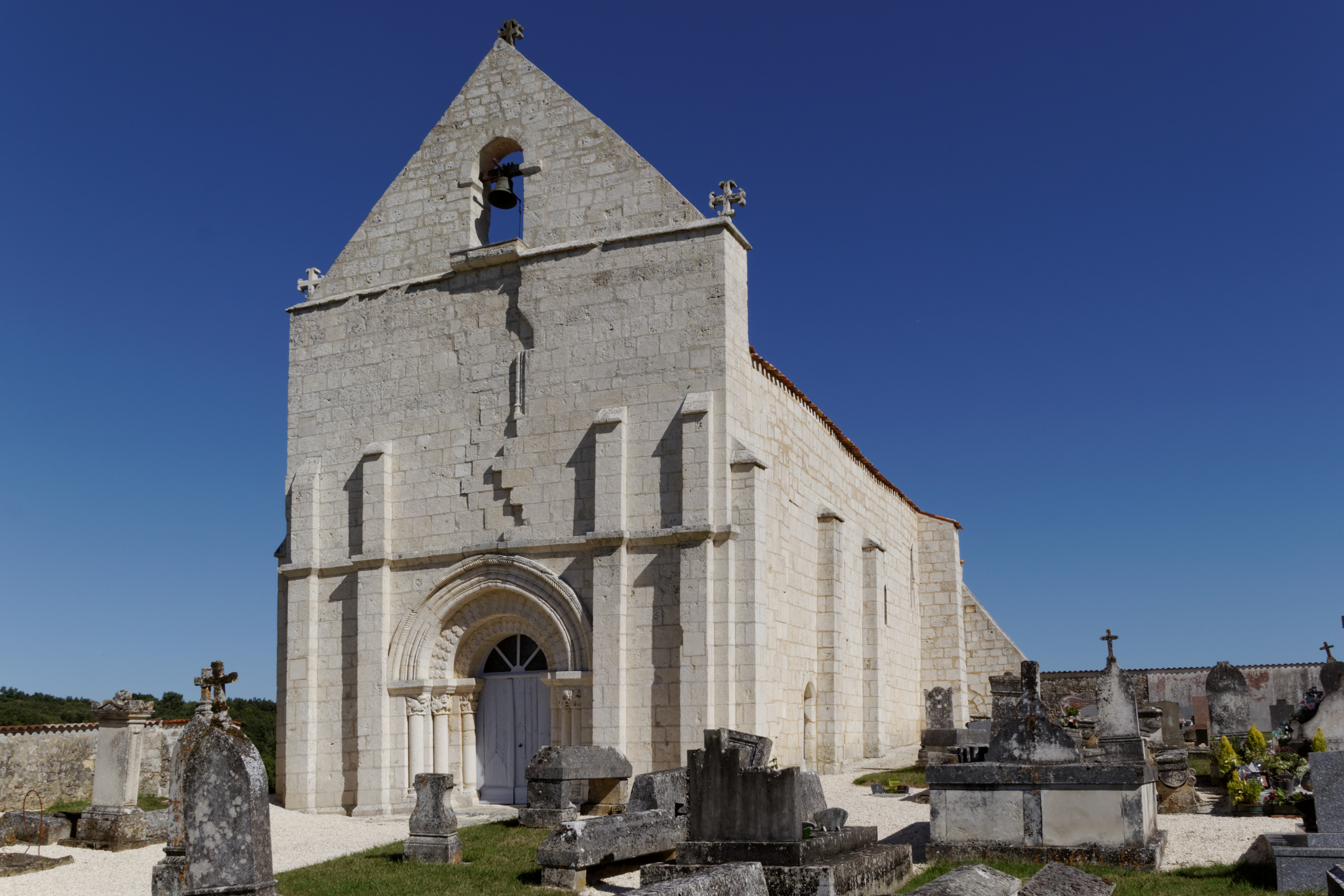 Église Saint-Hilaire de la Frédière (Inscrit) .